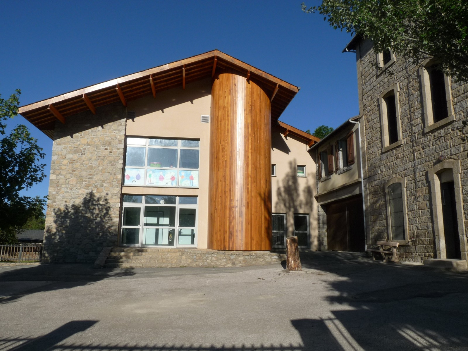 Ecole d'Egat, Pyrénées-Orientales, France